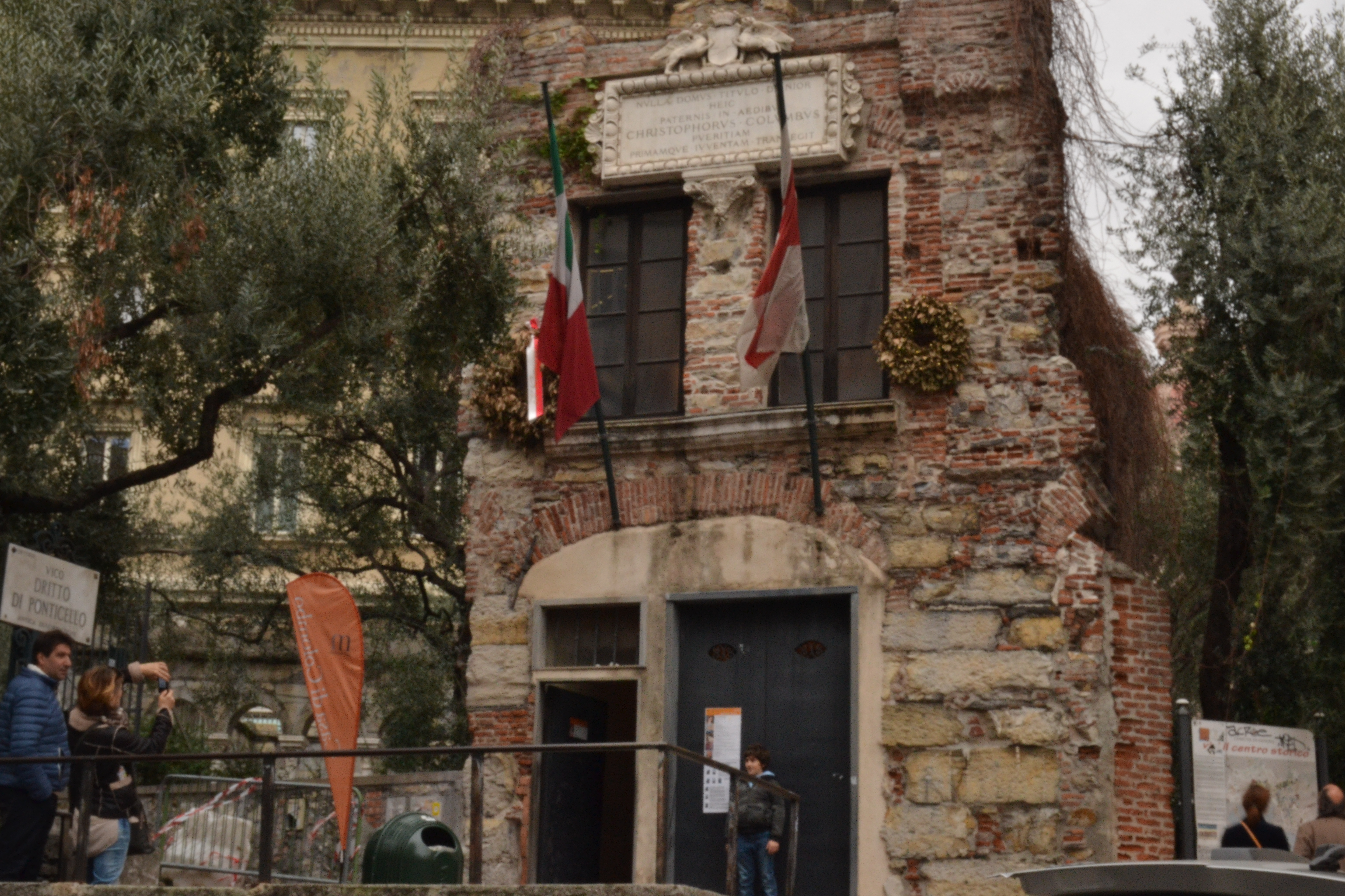 Maison de Christophe Colomb à Gênes